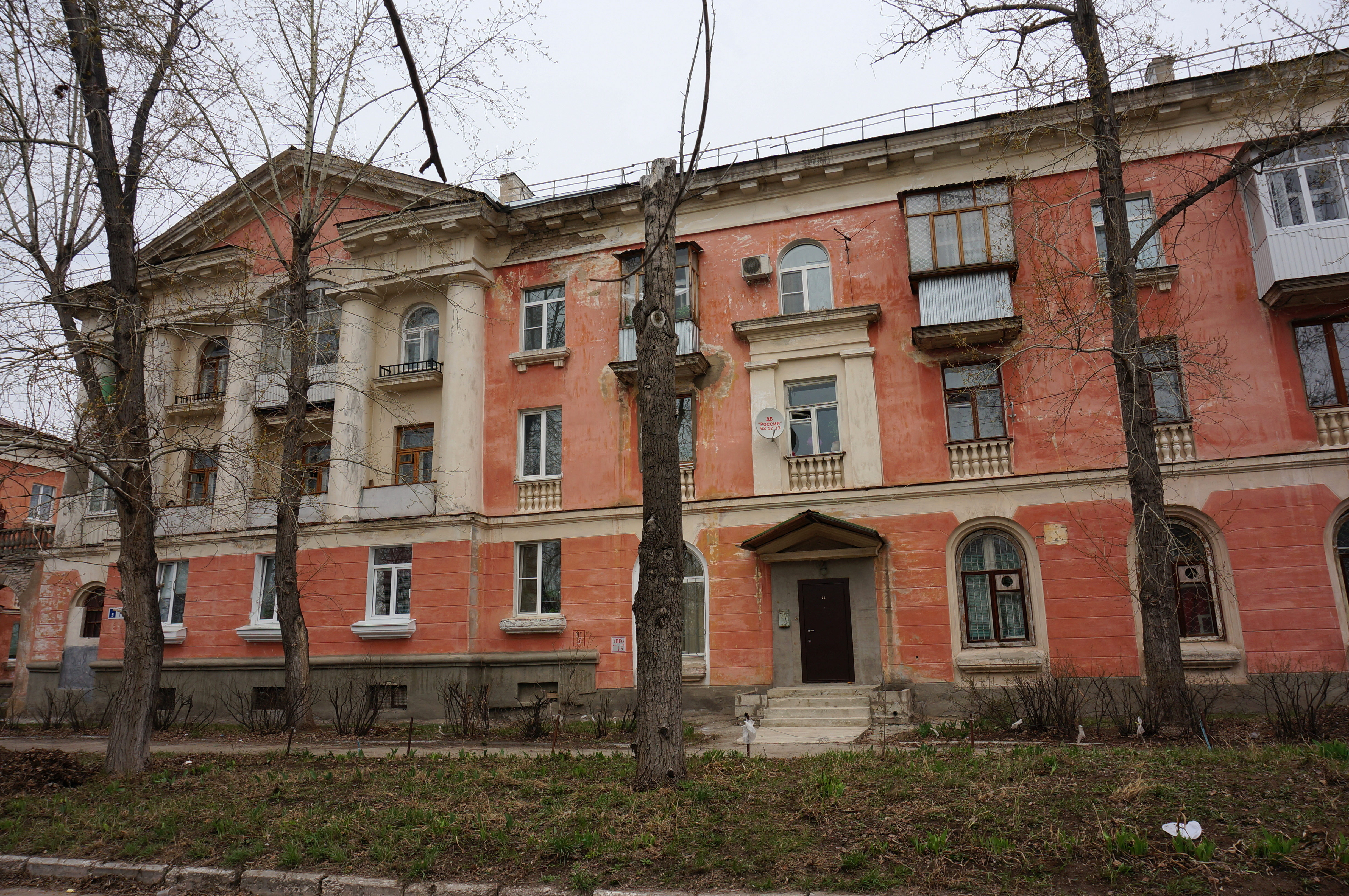 Россия, Тольятти, ул. Носова 5. Проект здания разработан Ленгипрогором, строилось в 1952—1956 годах для дирекции строительства порта и судоремонтного завода. Здание украшено массивными колоннами на уровне 2 и 3 этажей.